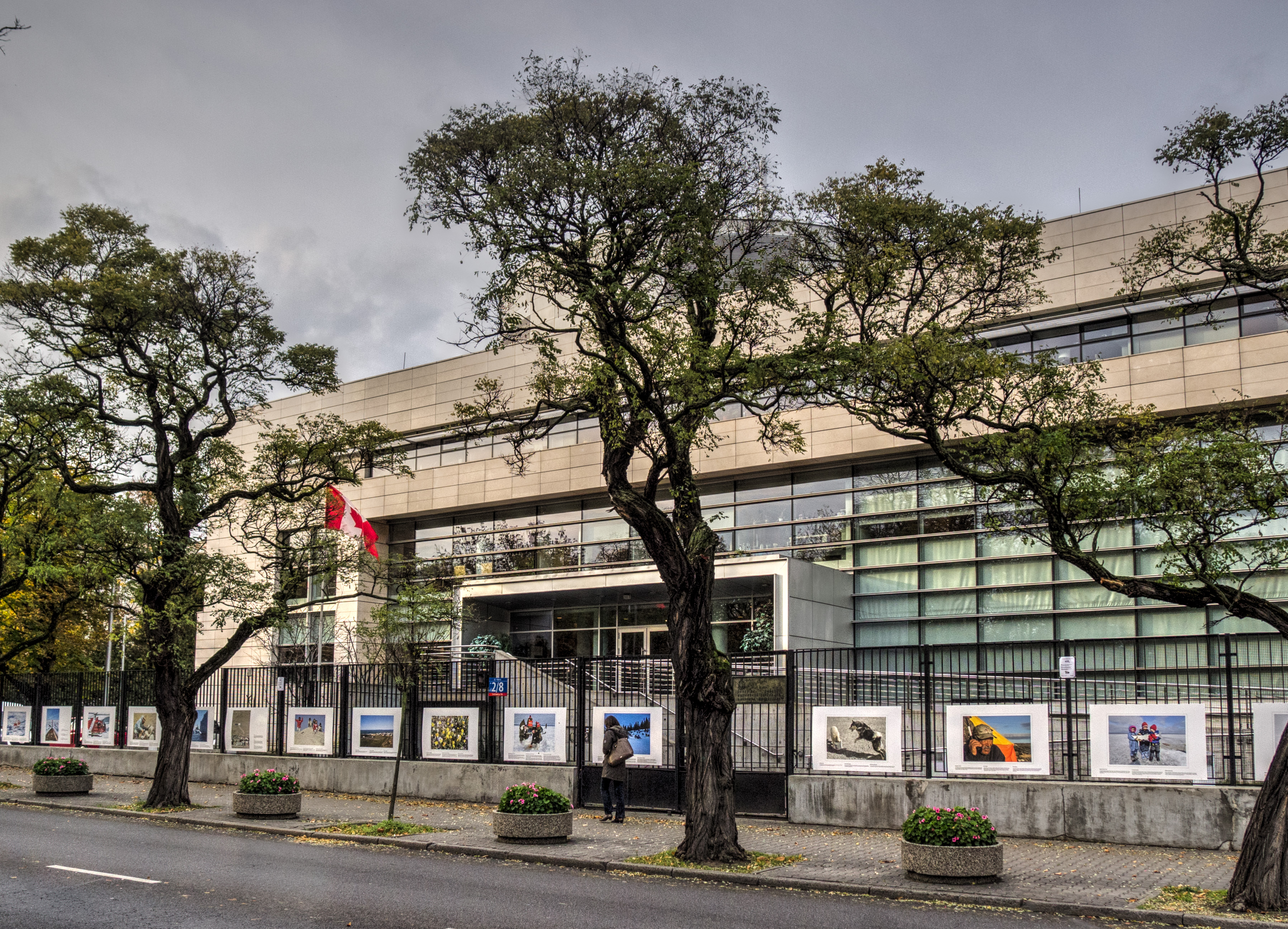 Ambasada Kanady w Warszawie